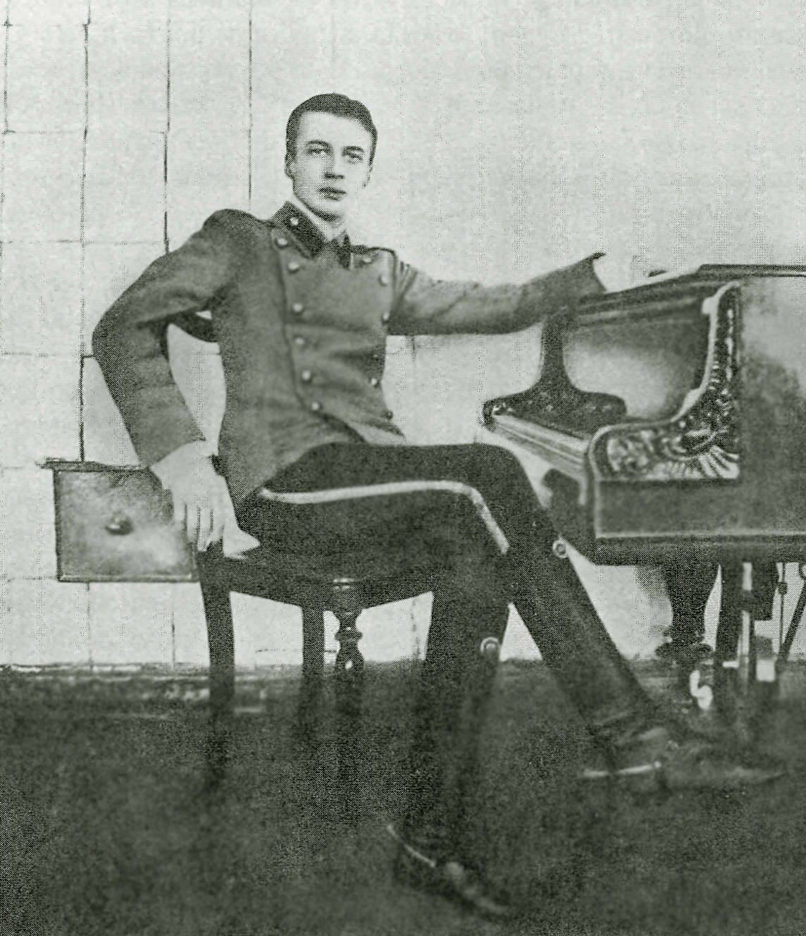 Олег Константинович Романов. Скан фото, приведённого в книге : Завьялова Л.,Орлов К.Великий князь Константин Константинович и великие князья Константиновичи. СПб.2009. ISBN 978-5-93898-225-3